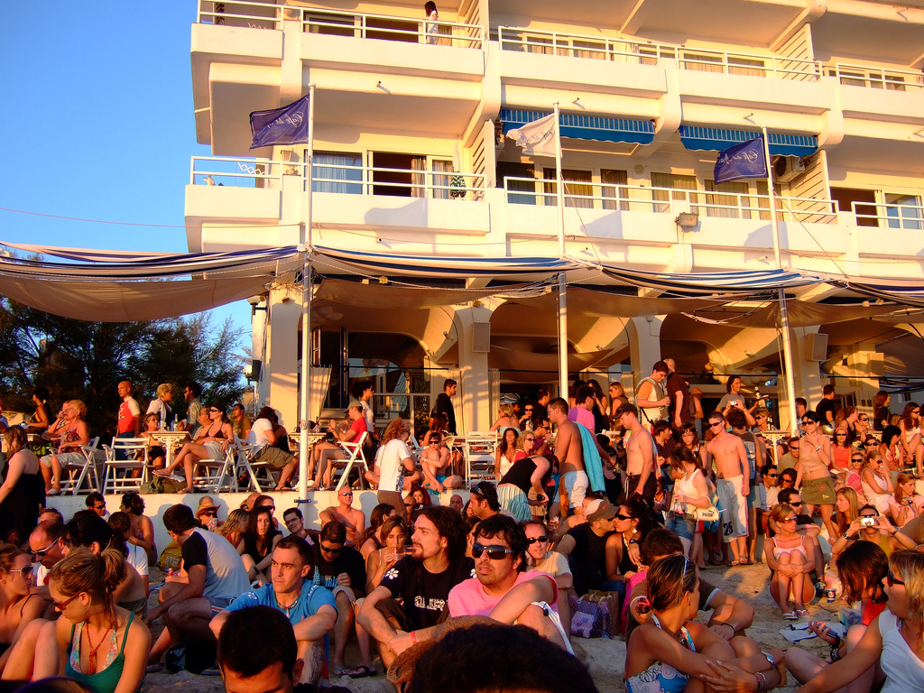 Café del Mar, St Antoni